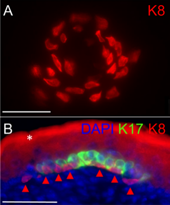 Fig 3. Shh es esencial para el desarrollo de TD MC. (A) K8 tinción de montaje completo en control (Shh GFPcre/+) en E18.5. (B) Tinción K8 y K17 en secciones de control en E18.5. Asterisco peridermia y tinción epidérmica inespecífica. Punta de flecha, tinción de células de Merkel K8+. Barras de escala, 50 μm.